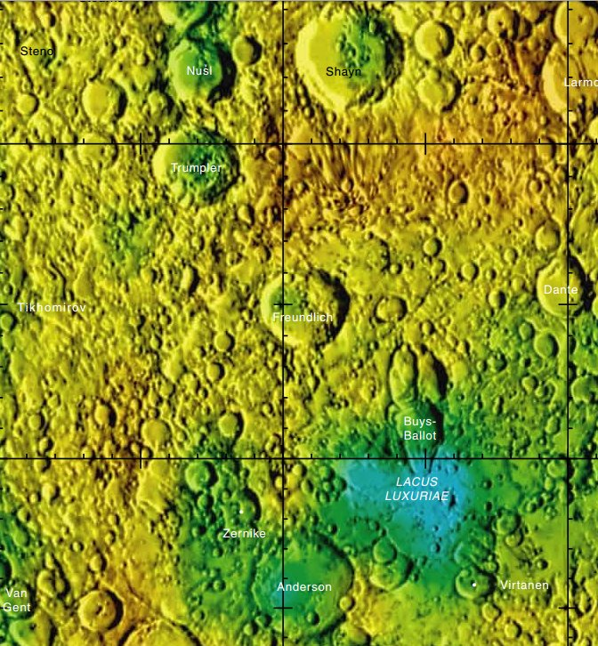 Lacus Luxiriae. (Cartografía LRO)